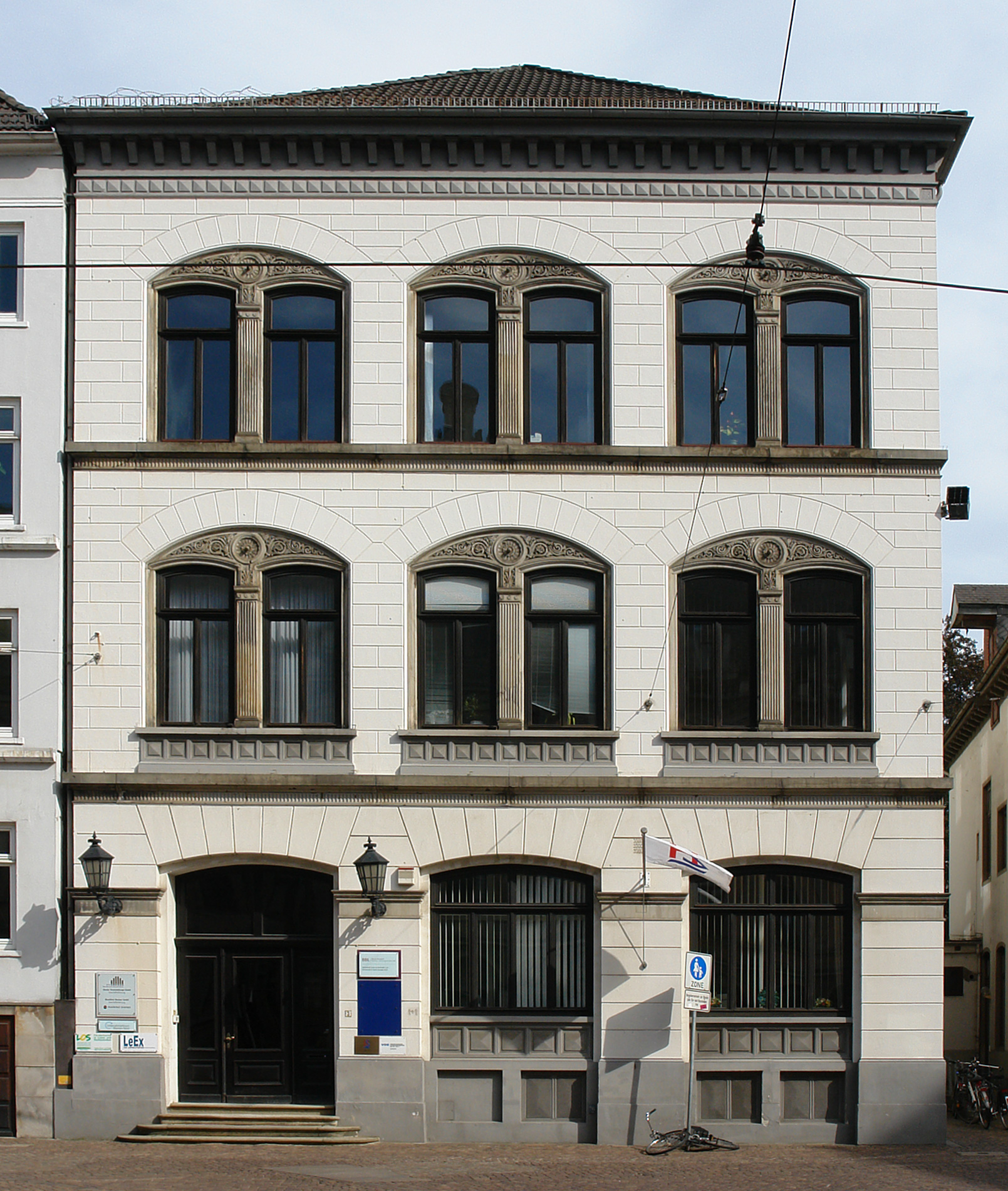 Haus Kulenkampff, Johannisloge "Zum Ölzweig" in Bremen, Domsheide 3.Das abgebildete Objekt ist ein geschütztes Kulturdenkmal in der Freien Hansestadt Bremen, mit der Nr. 0476 beim Landesamt für Denkmalpflege registriert.